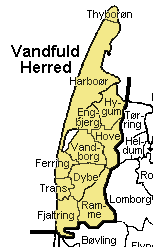 Vandfuld Herred, Ringkøbing Amt, Denmark Map by Svend-Erik Christiansen , edited by Nico-dk.